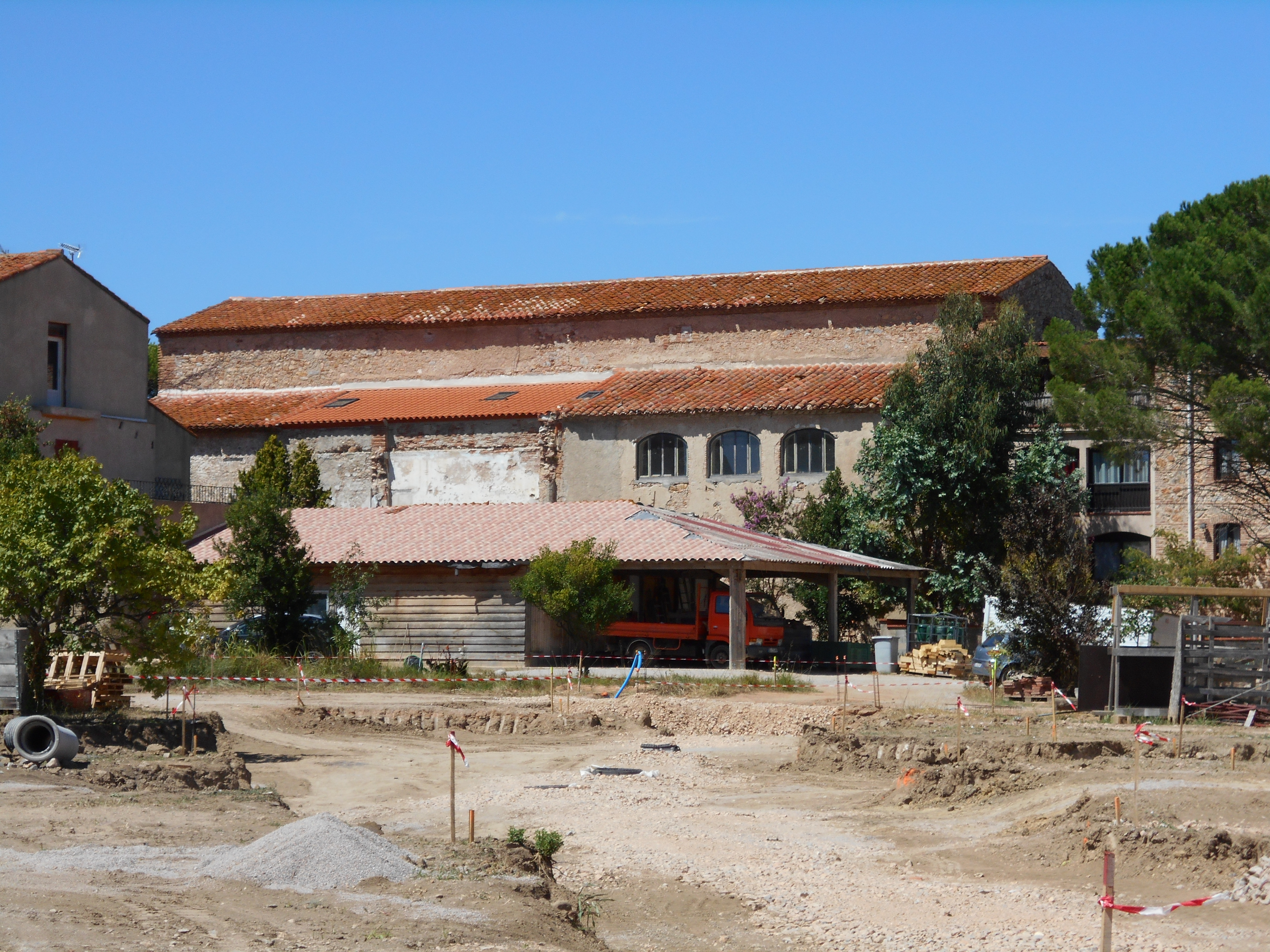 Sant Francesc d'Assís de Tuïr